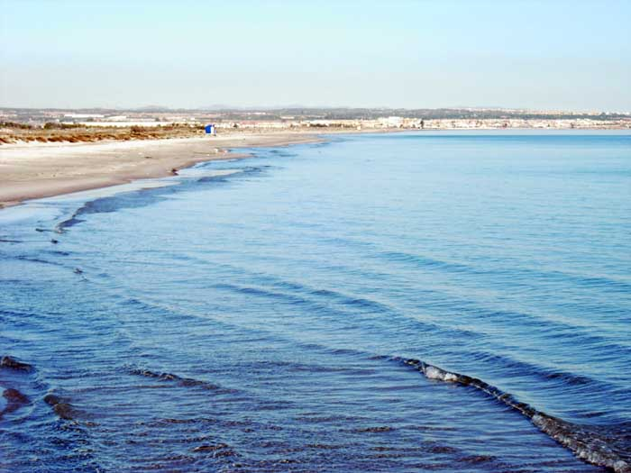 Vista desde el puerto